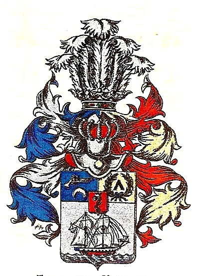 Aliaksandar Kazarski Coat of arms